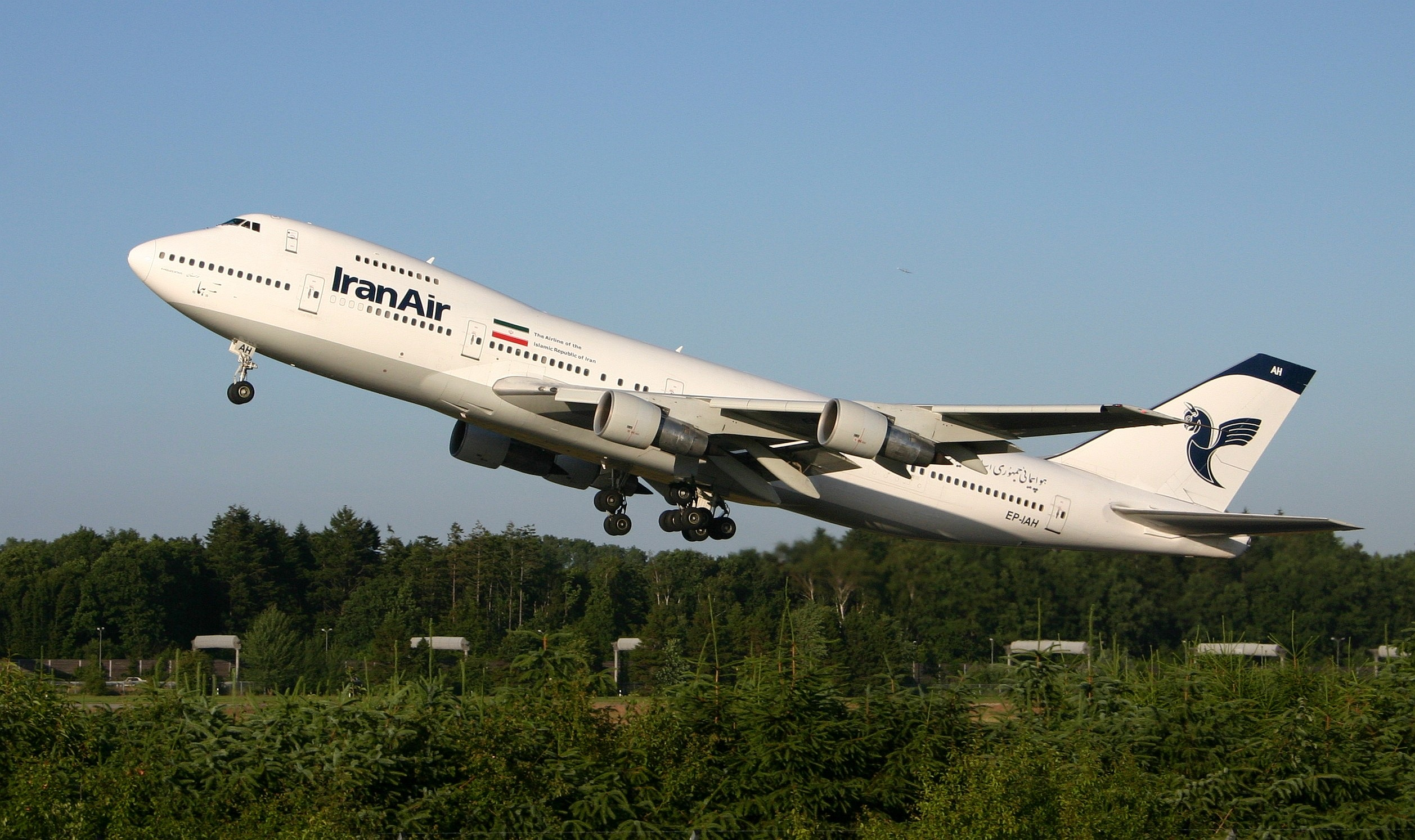 Boeing 747 200 - Germany, Hamburg